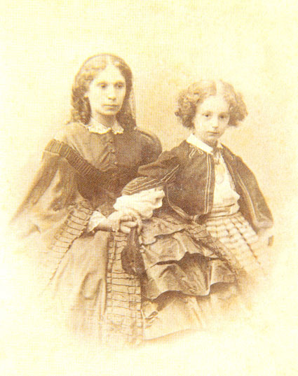 Elena Denisyeva with her daughter 1862-1863